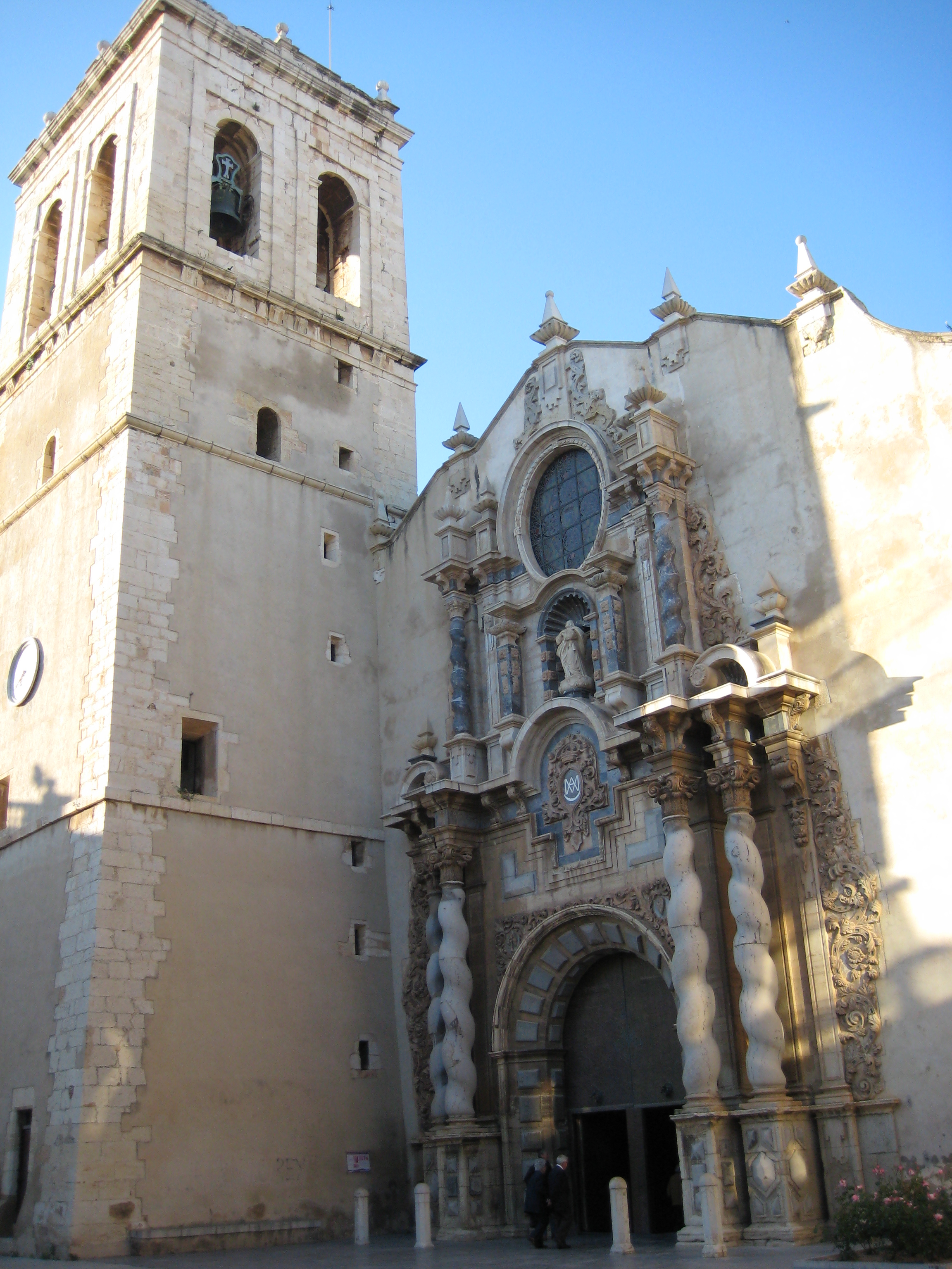 Església de la Mare de Déu de l'Assumpció de Vinaròs (Baix Maestrat)